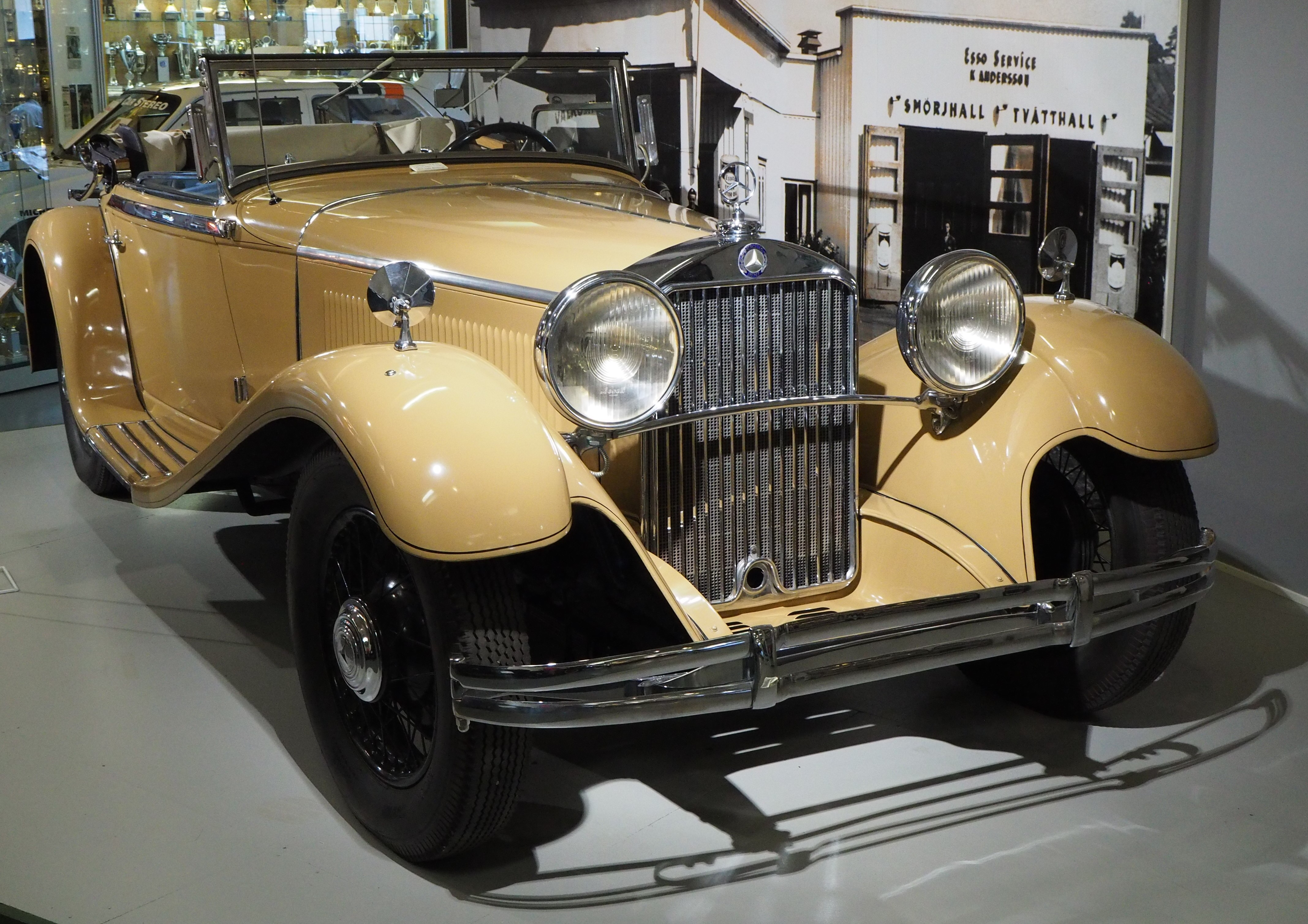 1931 Mercedes-Benz Mannheim 370 S Cabriolet C